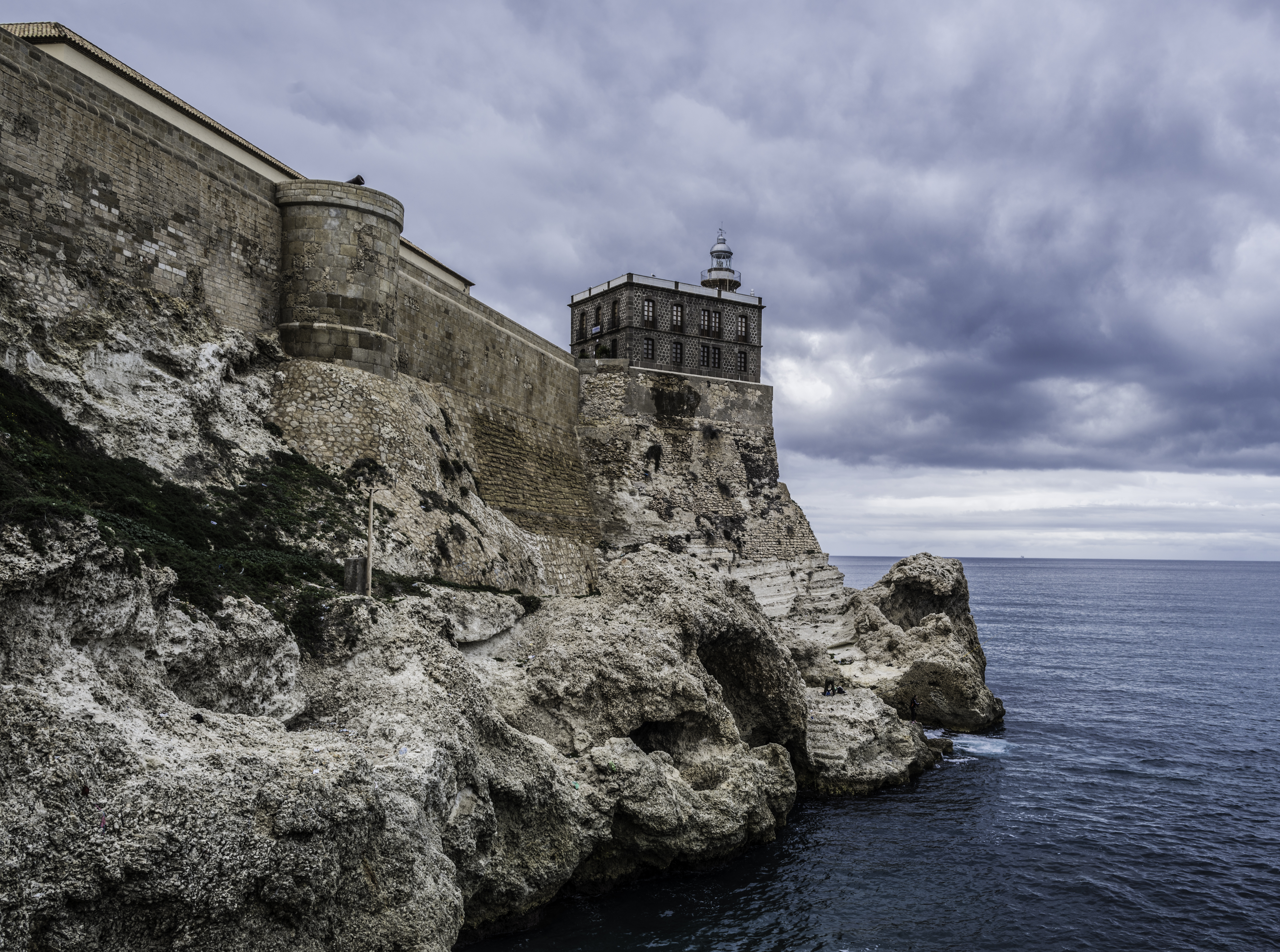 FRENTE DE LEVANTE, TORREÓN DEL BONETE Y FARO (MELILLA)